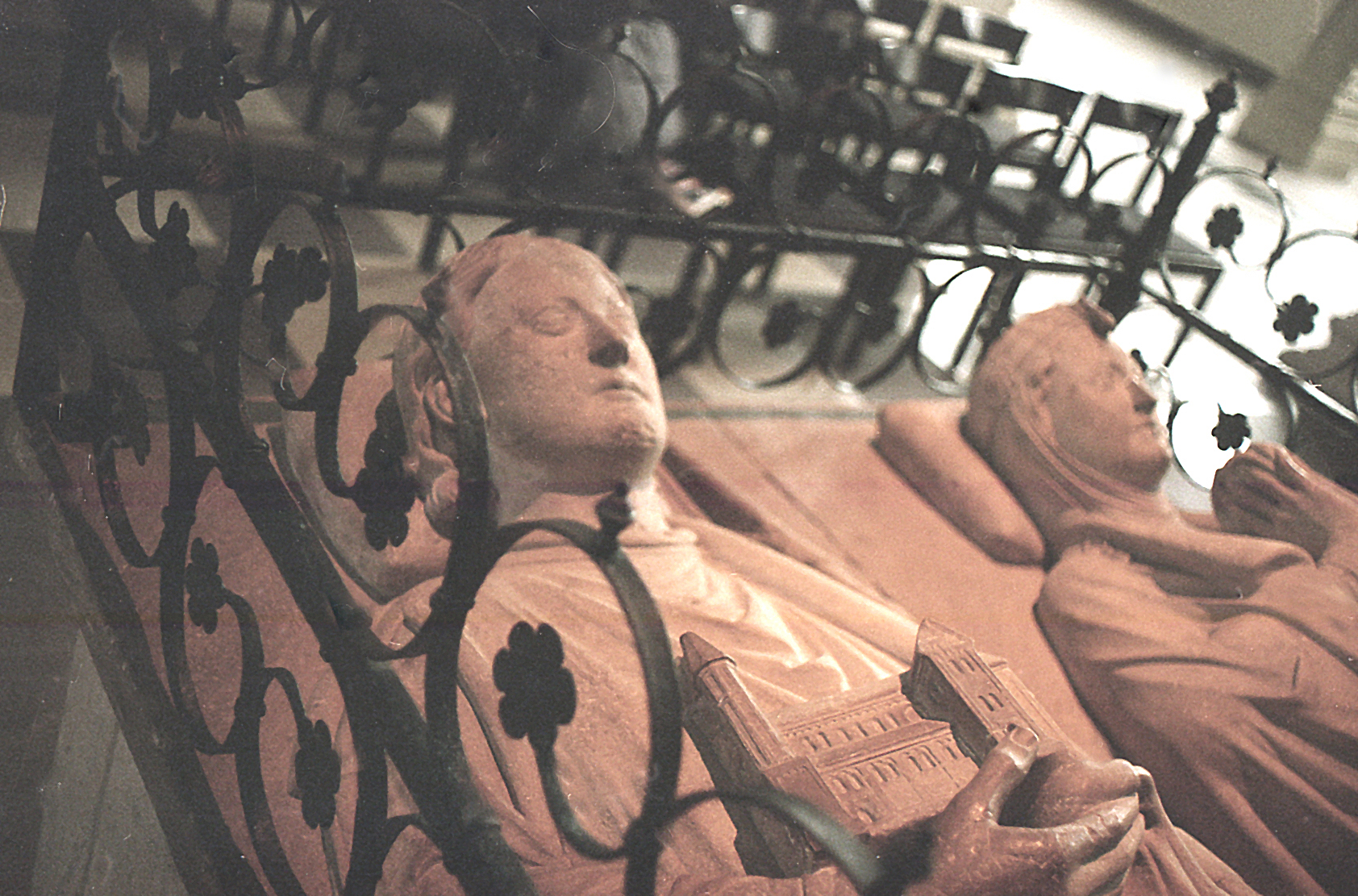 Вид Надгробия Генриха Льва и Матильды (ФРГ, Брауншвейг)